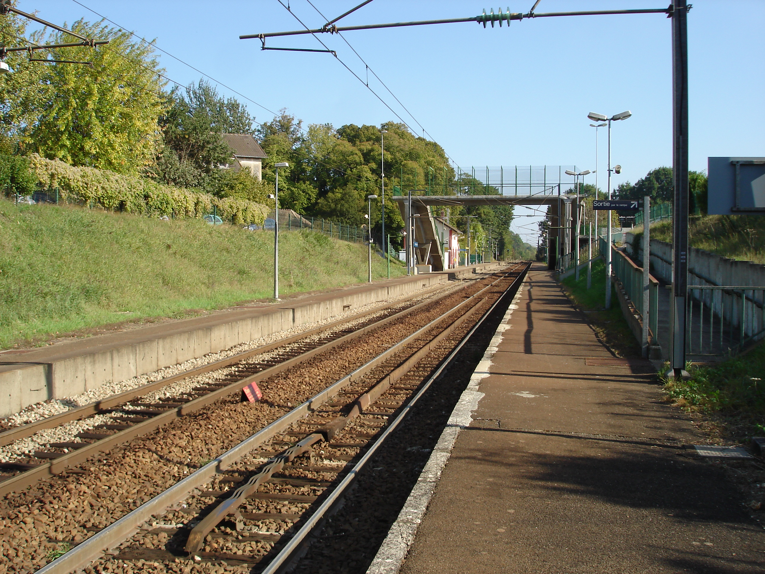 Gare d'Orgerus - Béhoust (78) : Vue en direction de Paris, du quai pour Dreux.